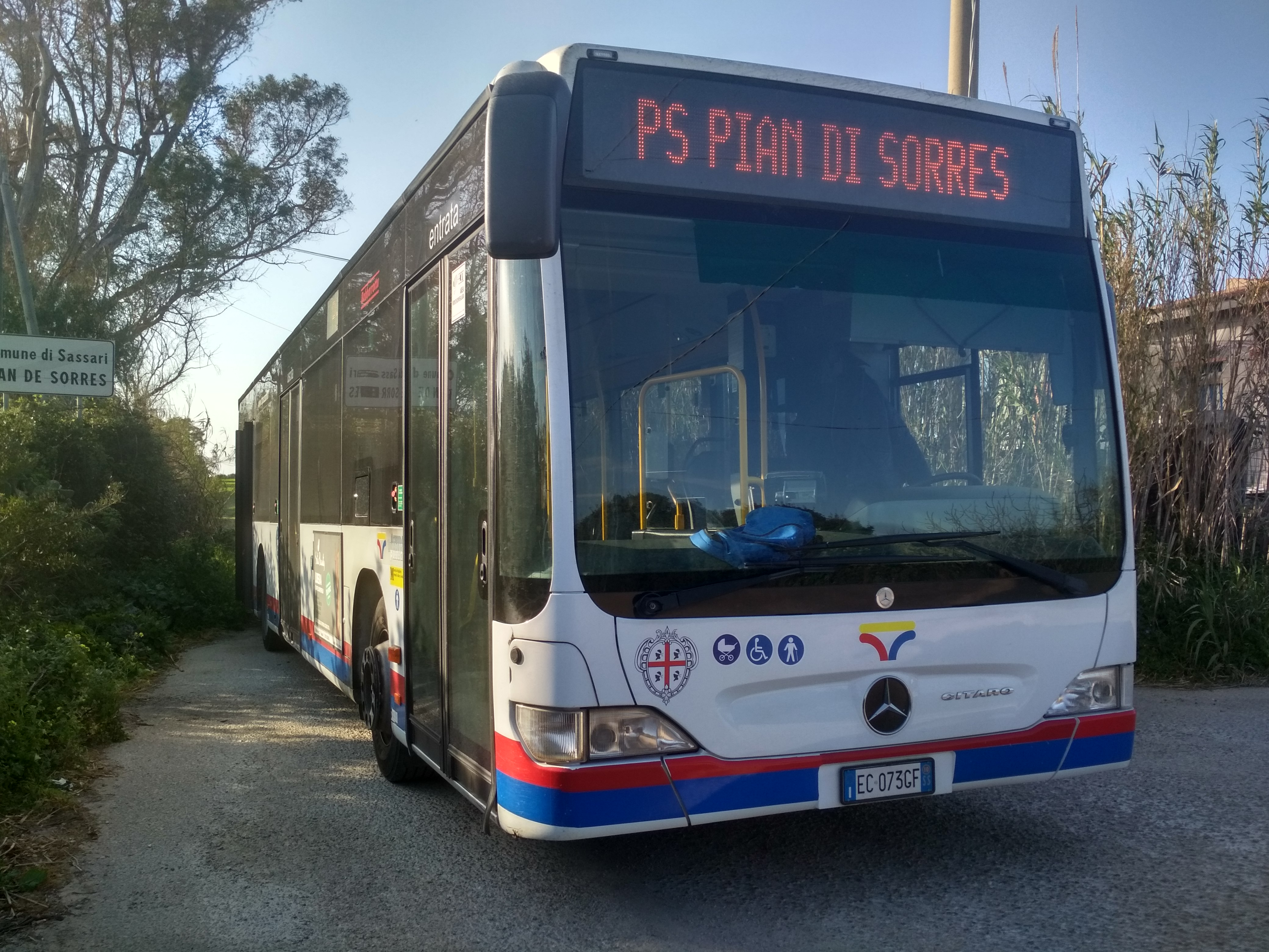 Mercedes Benz Citaro nella linea PS di ATP S.p.A.